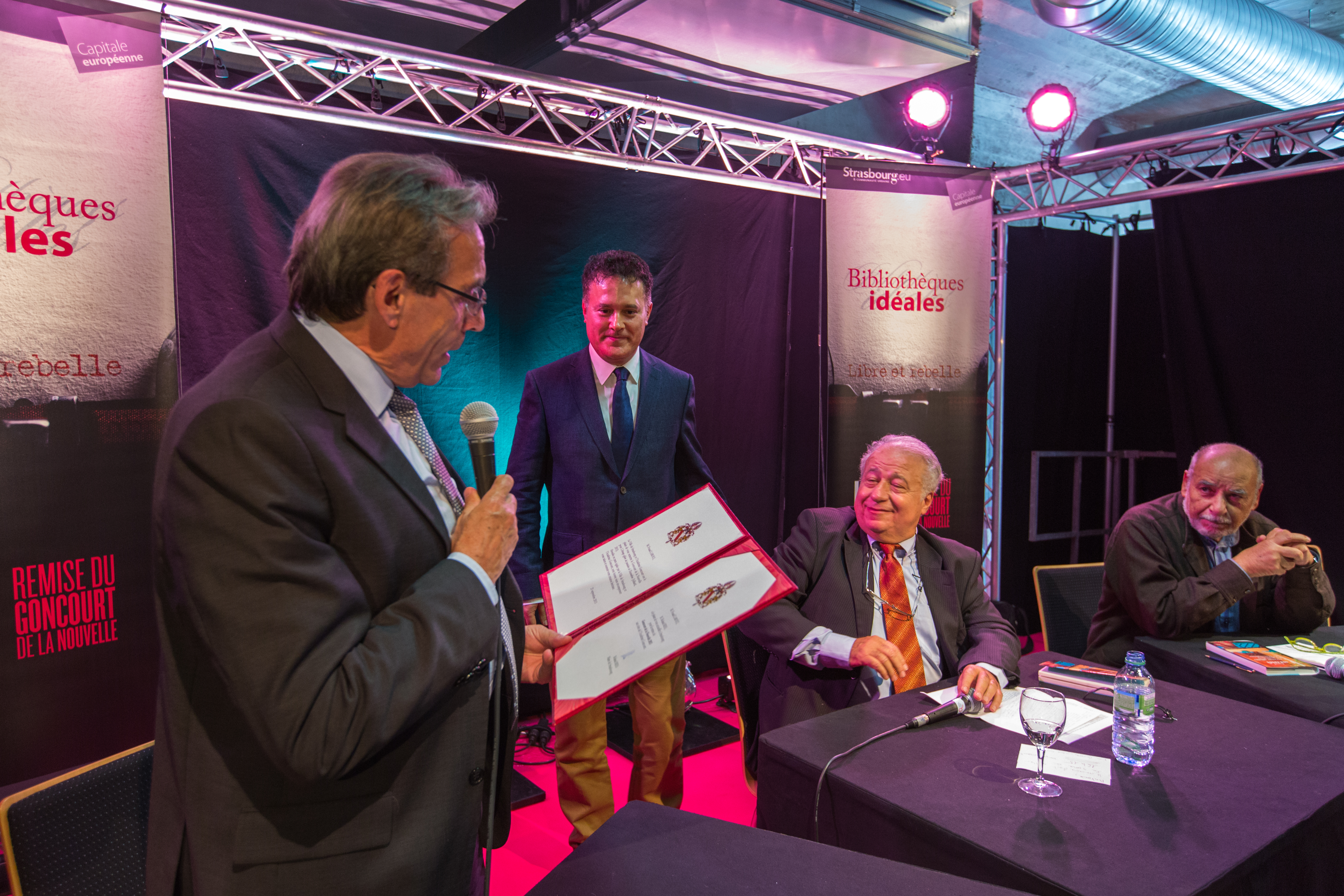 Roland Ries remet le Goncourt de la nouvelle à Fouad Laroui Strasbourg 21 sept 2013 en présence d’Antoine Spire et Tahar Ben Jelloun.